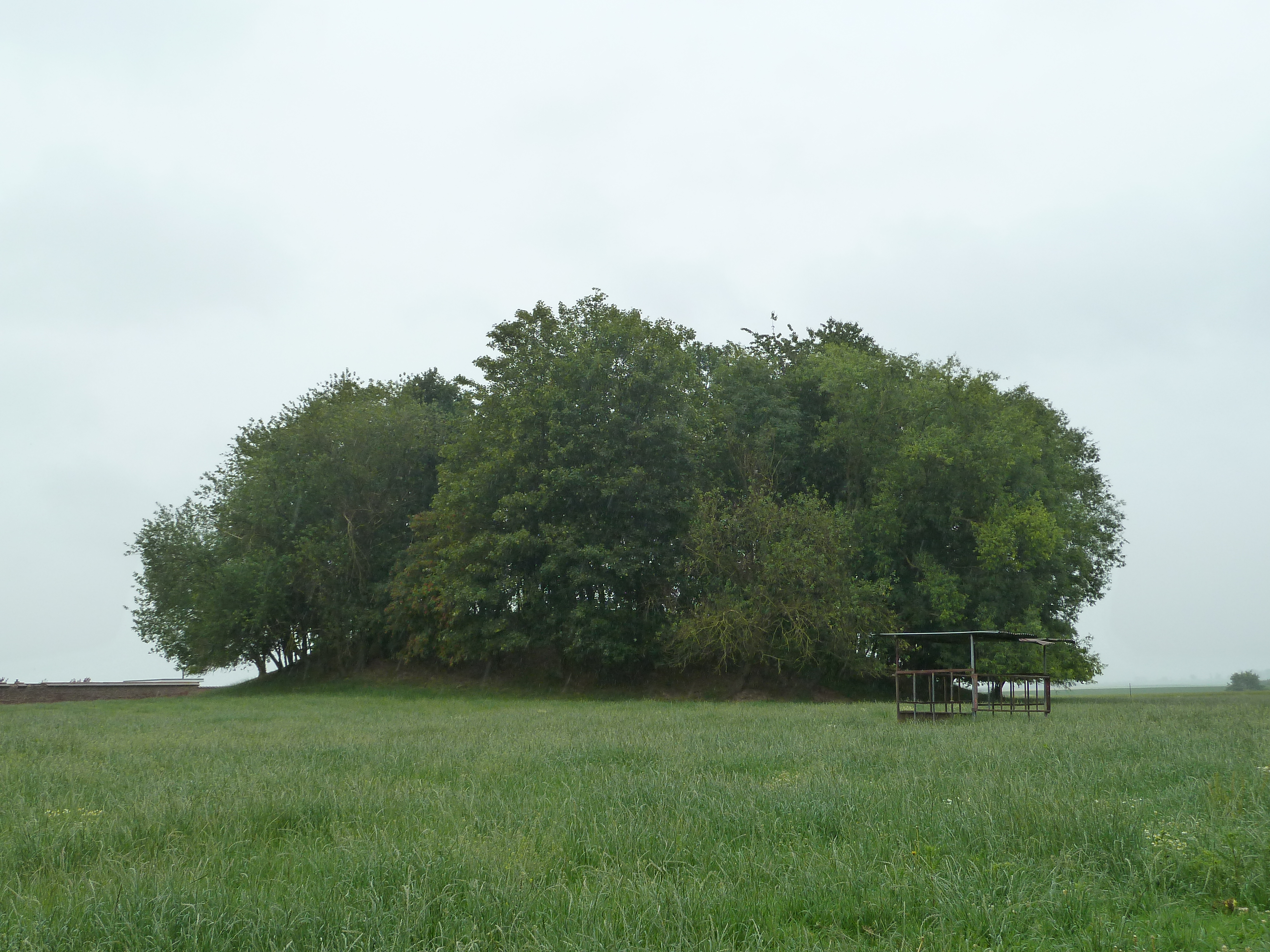 Tumulus d'Oleye, Oleye, Belgique